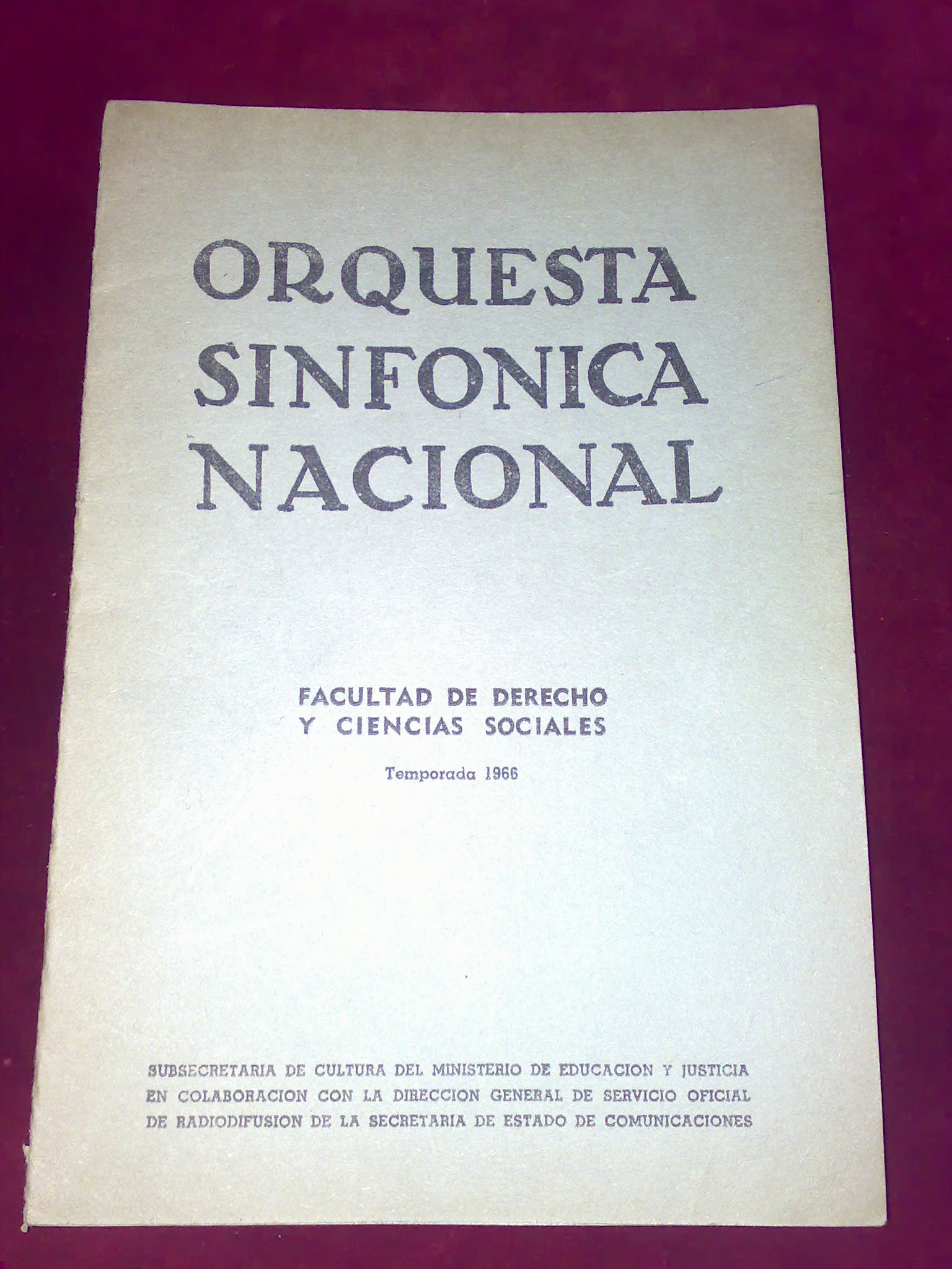 Portada de un histórico programa de mano de un concierto de la Orquesta Sinfónica Nacional Argentina en 1966. Ese año el ciclo de conciertos de la OSN se llevó a cabo en la Facultad de Derecho de la UBA.